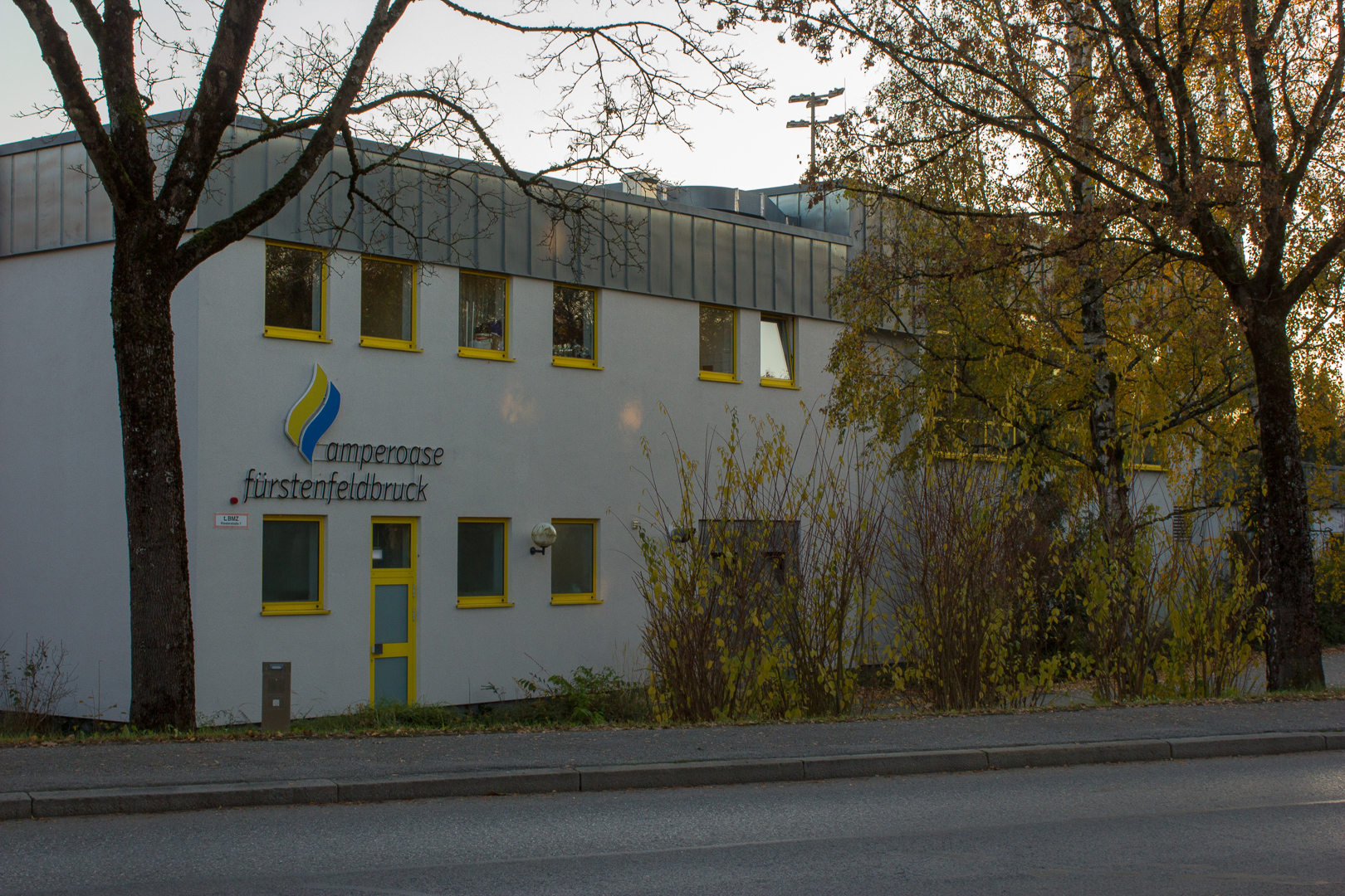 Das Foto zeigt die Außenansicht der AmperOase von Norden.